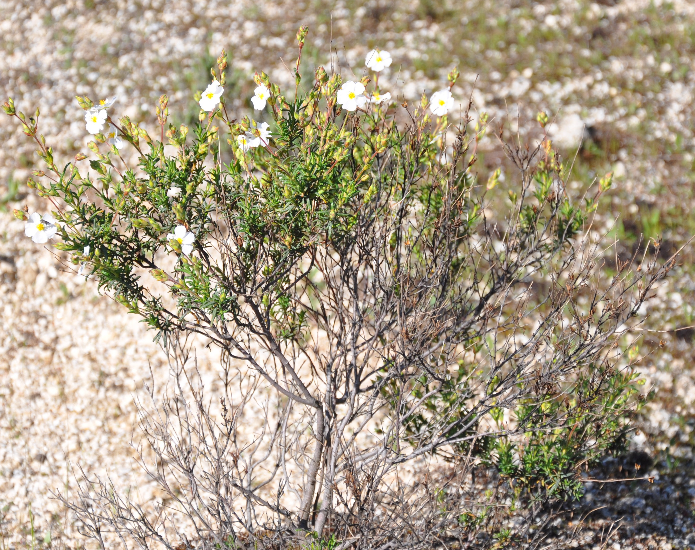 Jaguarcillo (Halimium umbellatum), Miranda do Douro, Portugal